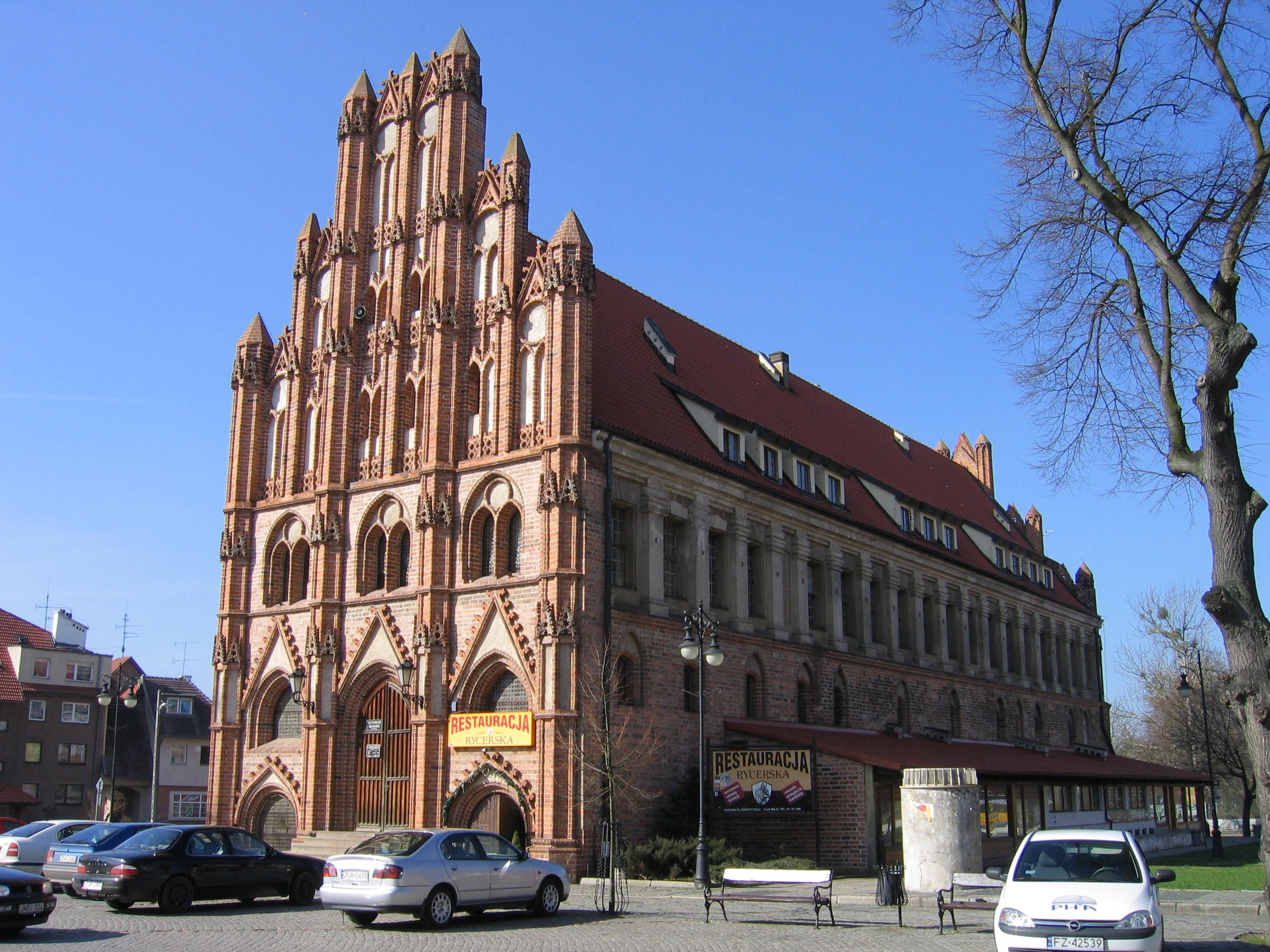 Chojna - ratusz